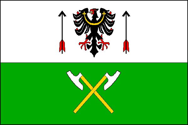 Vlajka obce Mrsklesy